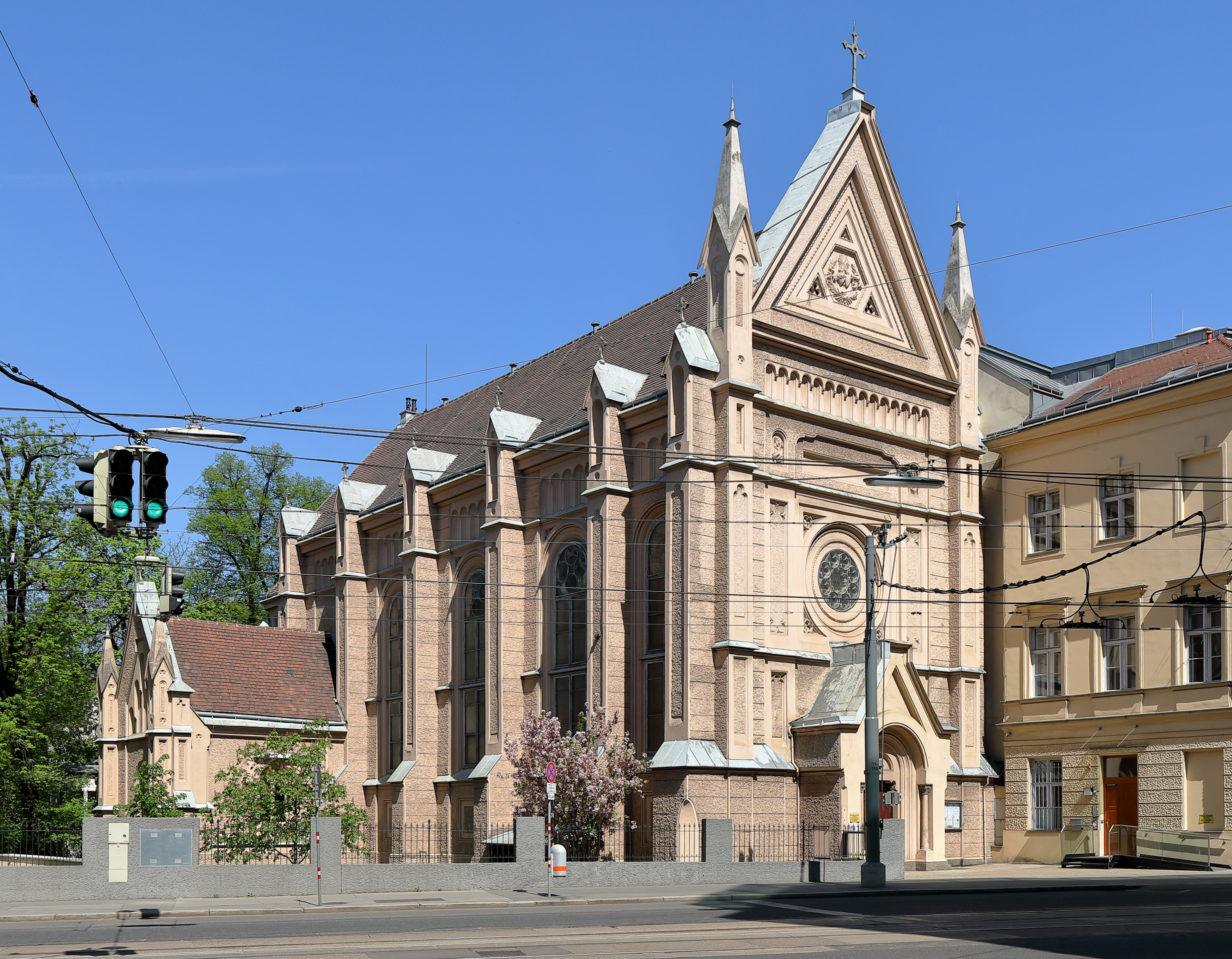 Die Sacré-Coeur-Klosterkirche am Rennweg im 3. Wiener Gemeindebezirk Landstraße. Der einschiffige Saalbau mit Krypta wurde von 1875 bis 1877 nach Plänen von Ferdinand Zehengruber in einem neuromanisch-neugotischen Stil errichtet.